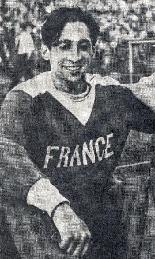 Marcel Hansenne, en septembre 1946.